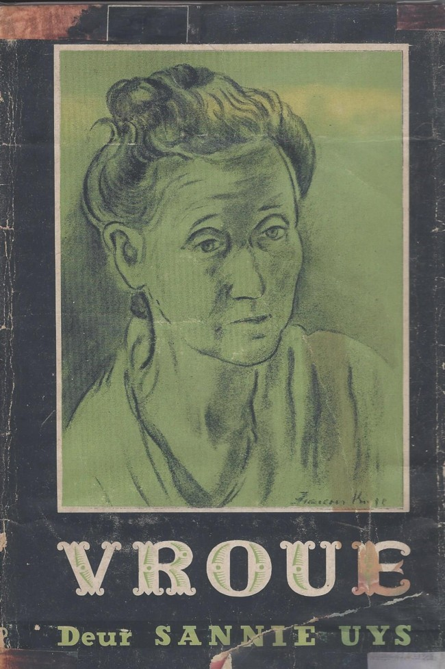 Skrywer, Sannie Uys